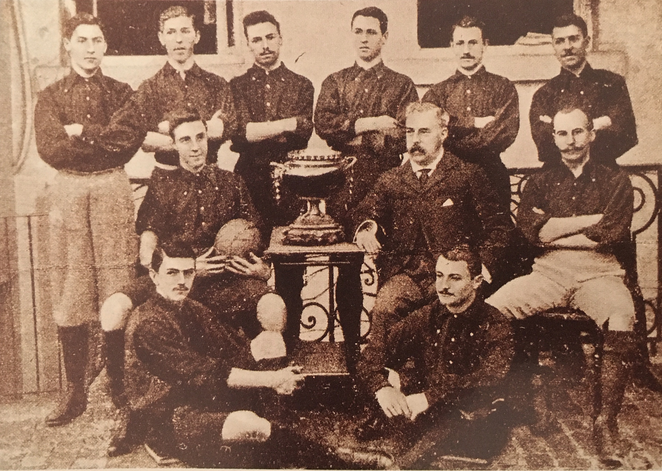 El equipo del FC Lieja, primer campeón de Bélgica en 1895–1896. — Alfred Wahl, Historia del fútbol, del juego al deporte (p. 53), colección «Biblioteca de bolsillo CLAVES» (nº 5), serie Deportes. Barcelona: Ediciones B, octubre 1997. Traducido del francés por Francesc Reyes; breve descripción en la página 155.